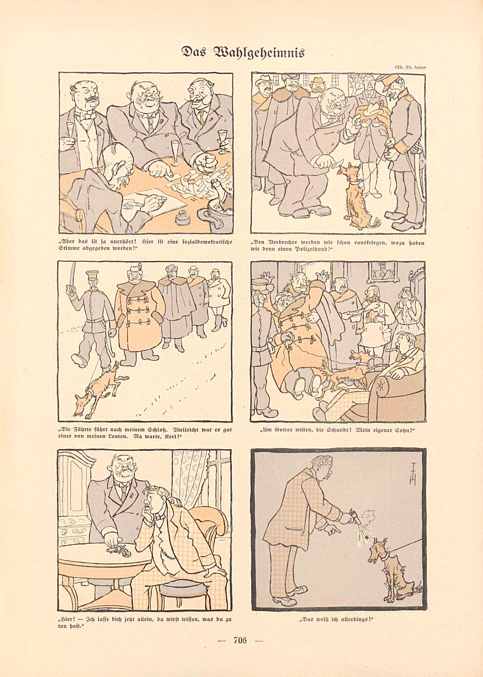 Simplicissimus, 1912, Heft 40, Seite 706. "Das Wahlgeheimnis", Karikatur über die Reichstagswahl.